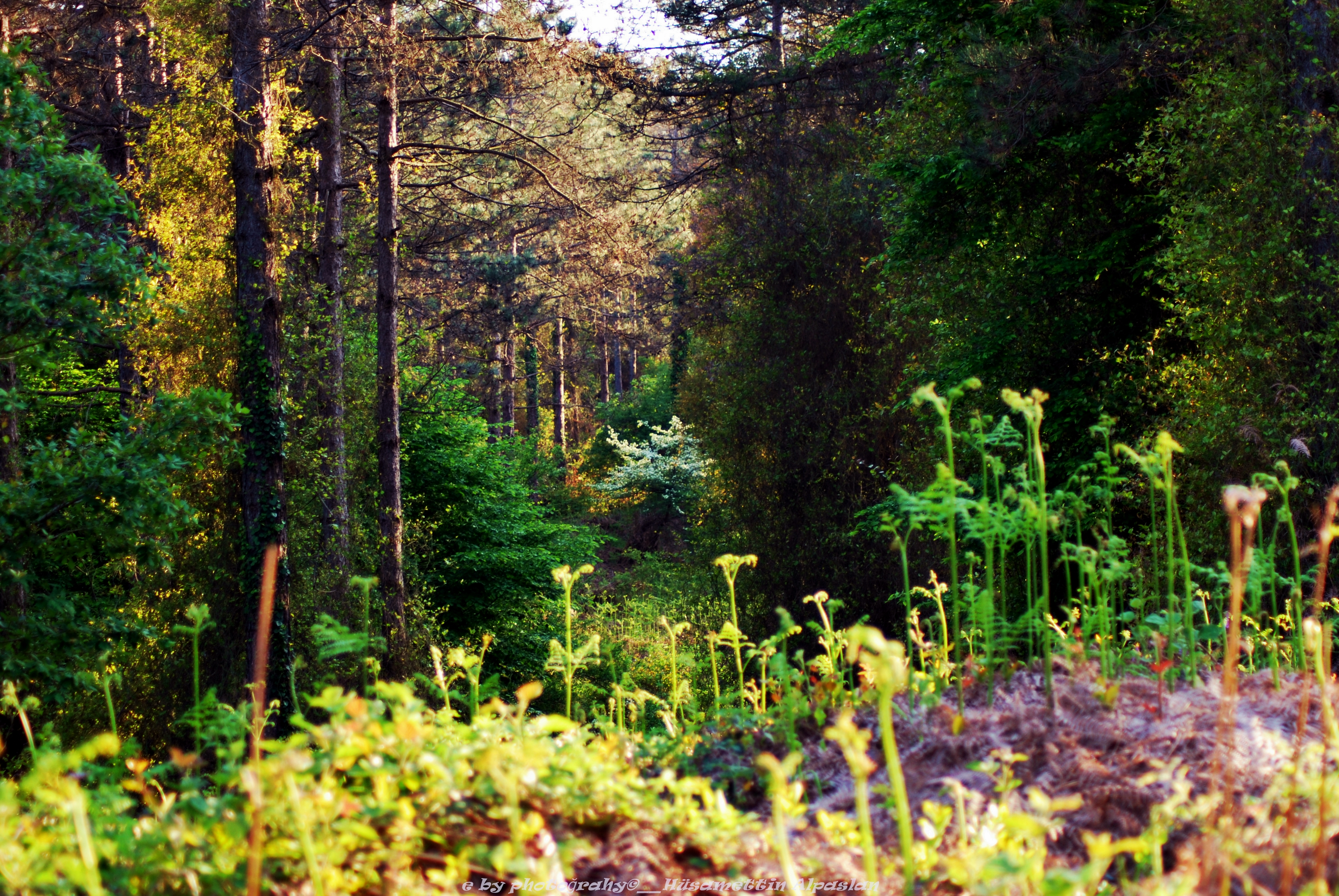 Çatal meşe ormanı.